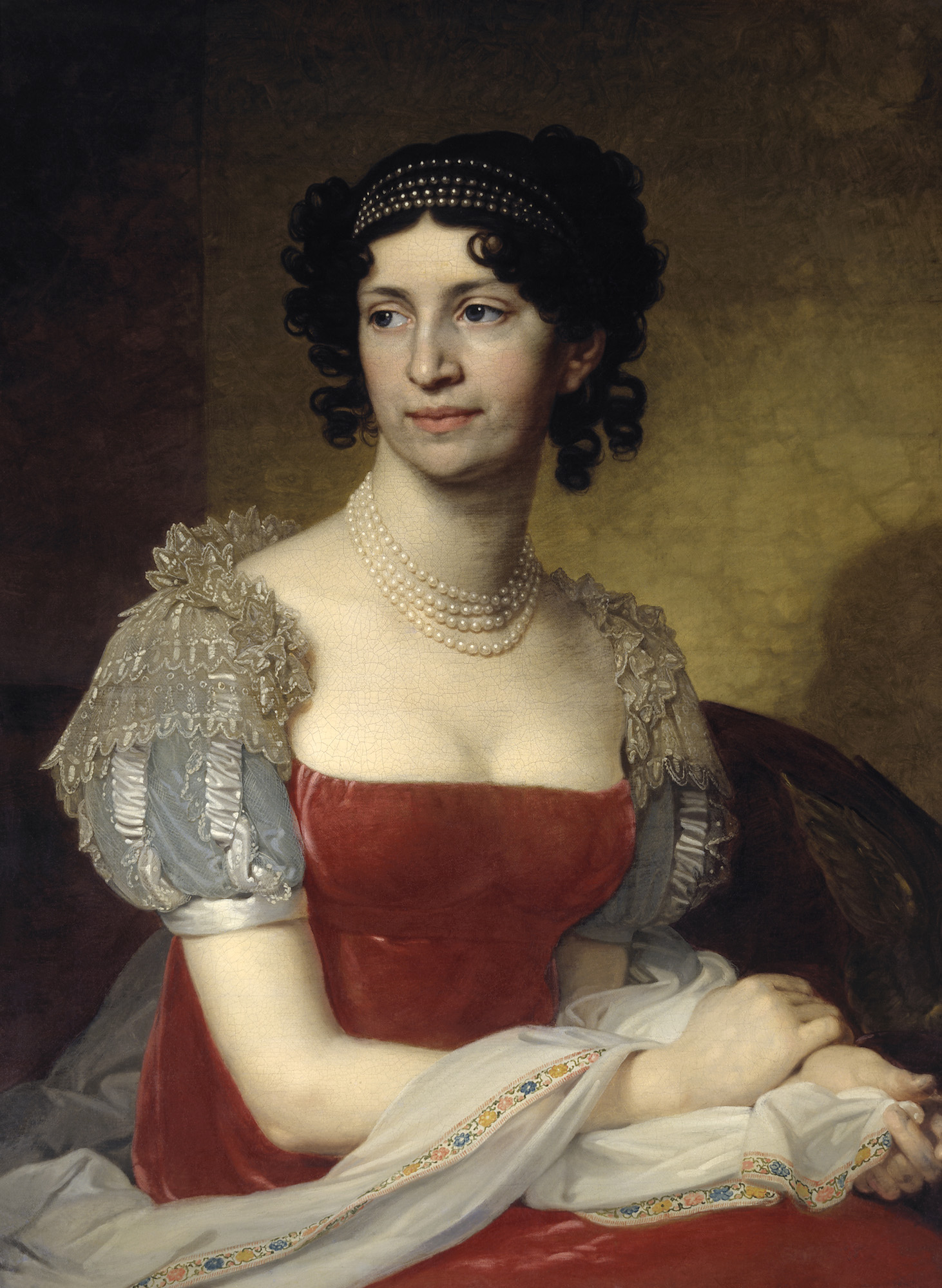 Княгиня Маргарита Ивановна Долгорукая (1785-1814), урожденная Апайщикова, супруг - Долгоруков, Алексей Алексеевич. Дочь петербургского именитого гражданина Ивана Андреевича Апайщикова (1728—1793) от брака с дочерью петербургского купца Прасковьей Ермолаевной Калитиной (1746—1802), родилась 5 октября 1785 г. Была 1-й женой князя Алексея Алексеевича Долгорукого (1775—1834), от которого имела 4 сыновей: Ростислава, Юрия, Сергея и Григория. Умерла в 1814 г. погребена в Симбирске, где ее муж тогда был губернатором.